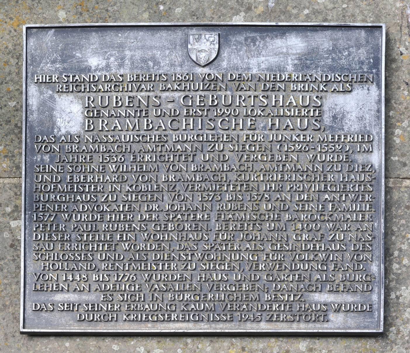 Gedenktafel auf dem Gelände der Realschule Oberes Schloss in Siegen zur Erinnerung an das Brambach-Haus (1573–1578 Wohnhaus von Jan Rubens und Maria Pypelinckx; Geburtshaus von Peter Paul Rubens).